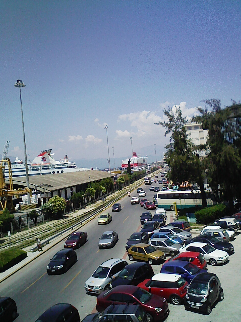 Patras, Othonos Amalias Avenue